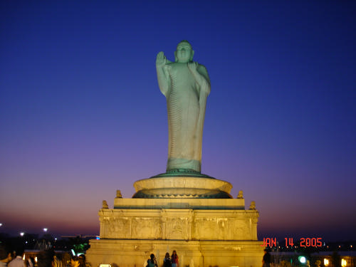 Buddha Statue in Hyderabad